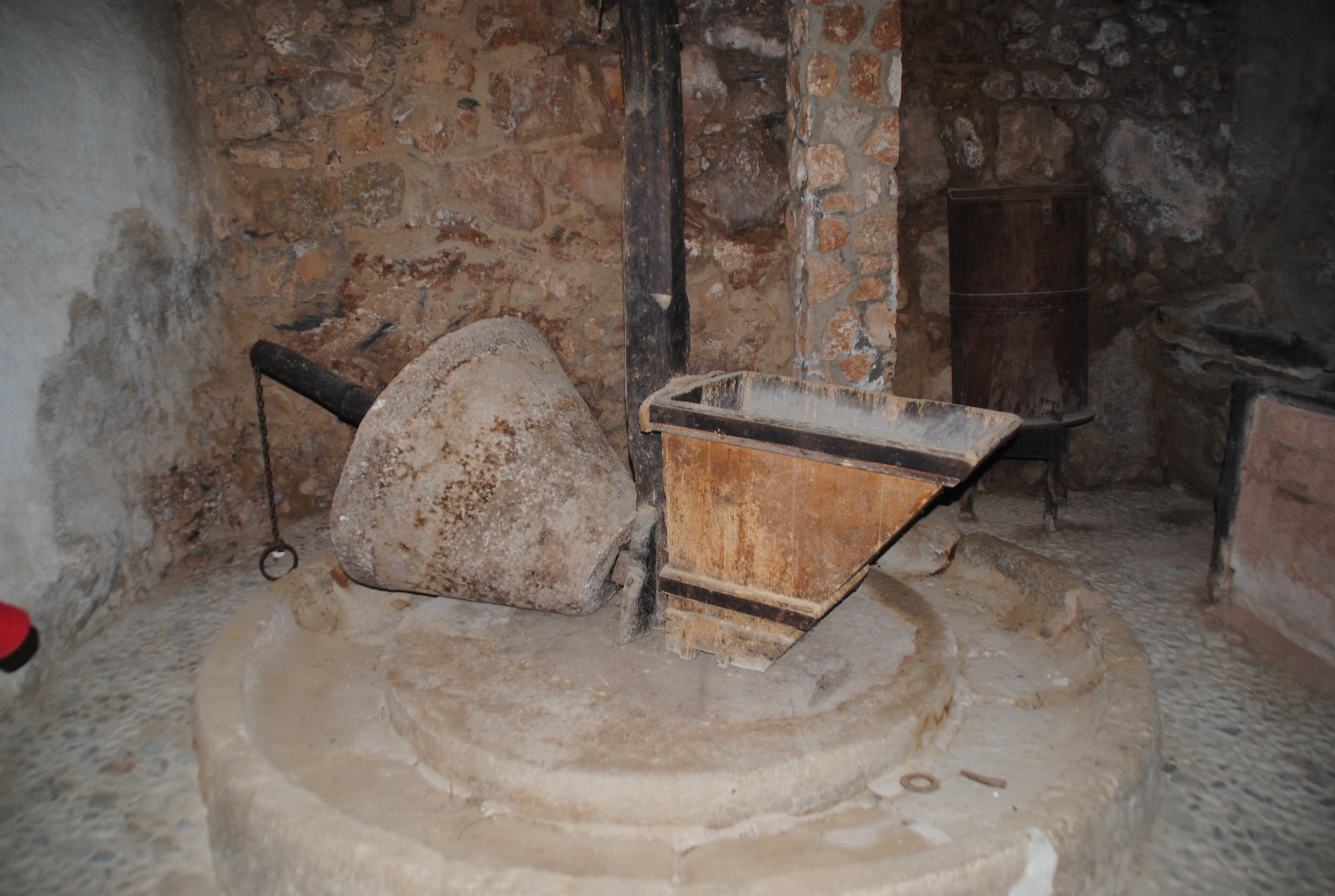 Trull Oli